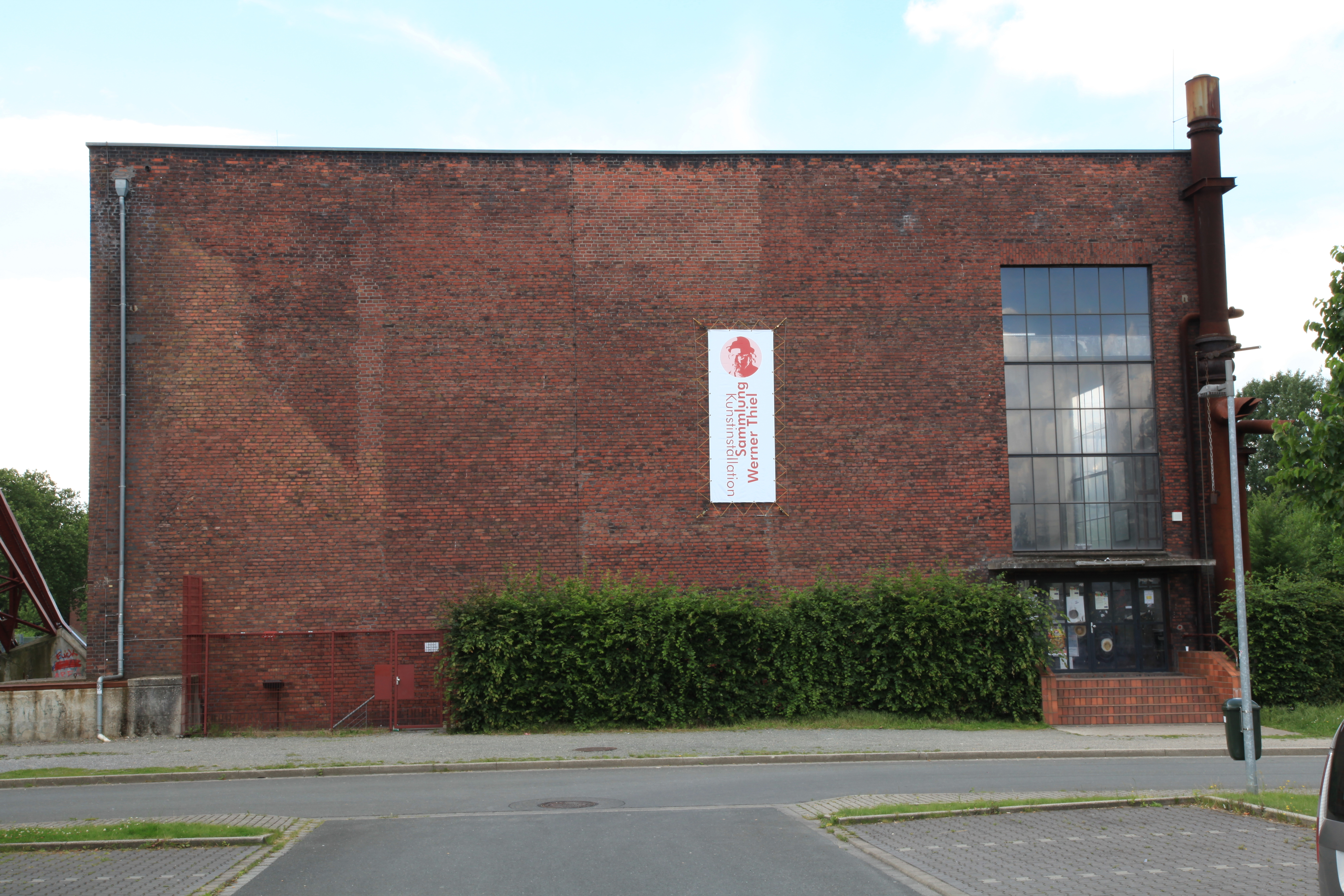 Museum: Nördliches Maschinenhaus von Zeche Consolidation Schacht 9 in Gelsenkirchen